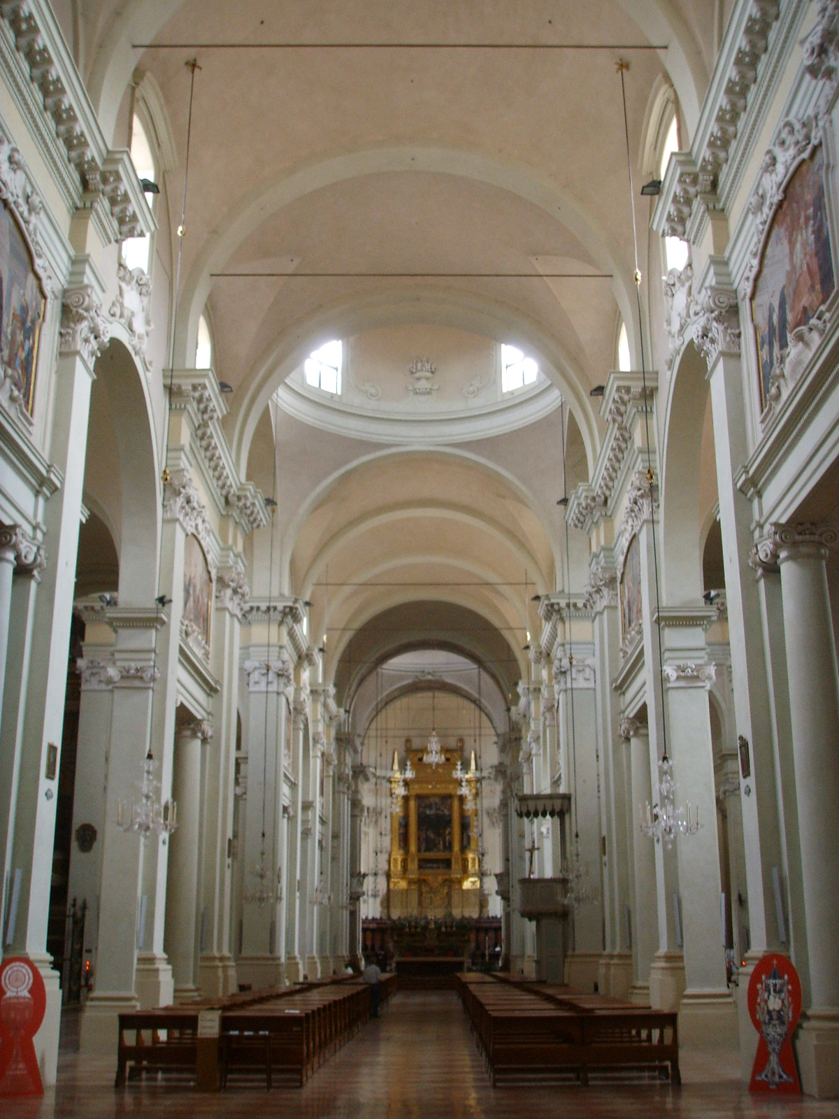 Bologna, san domenico, interno